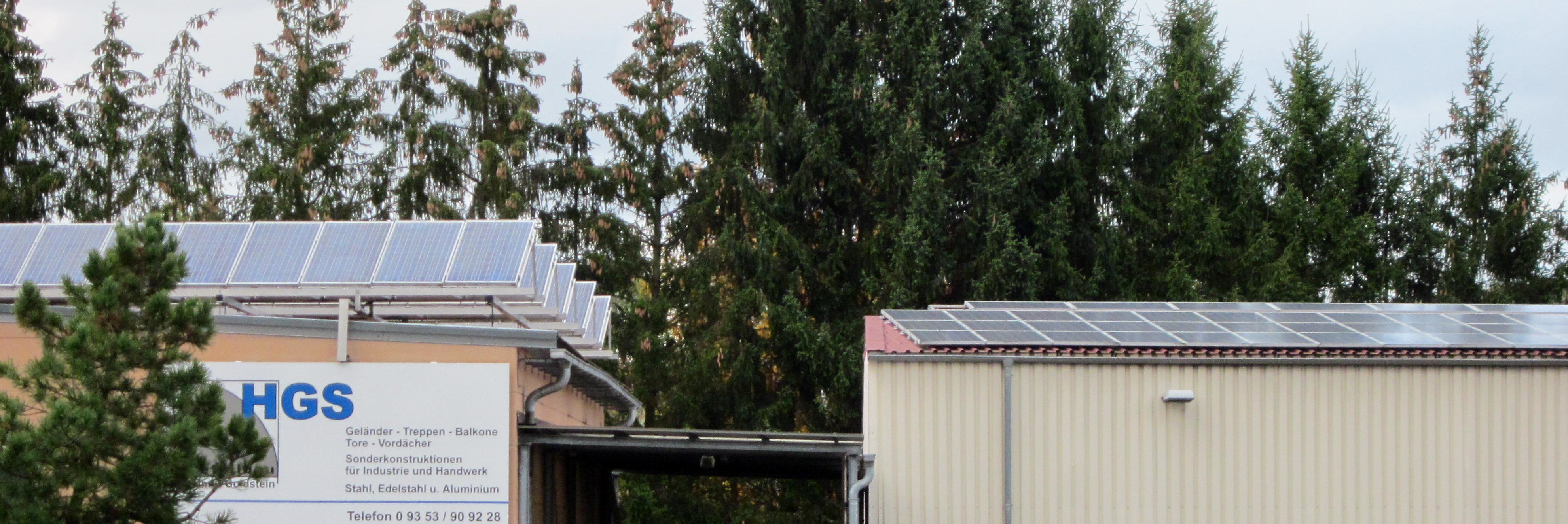 PV-Anlage auf dem Dach eines Betriebsgebäudes in Karlstadt